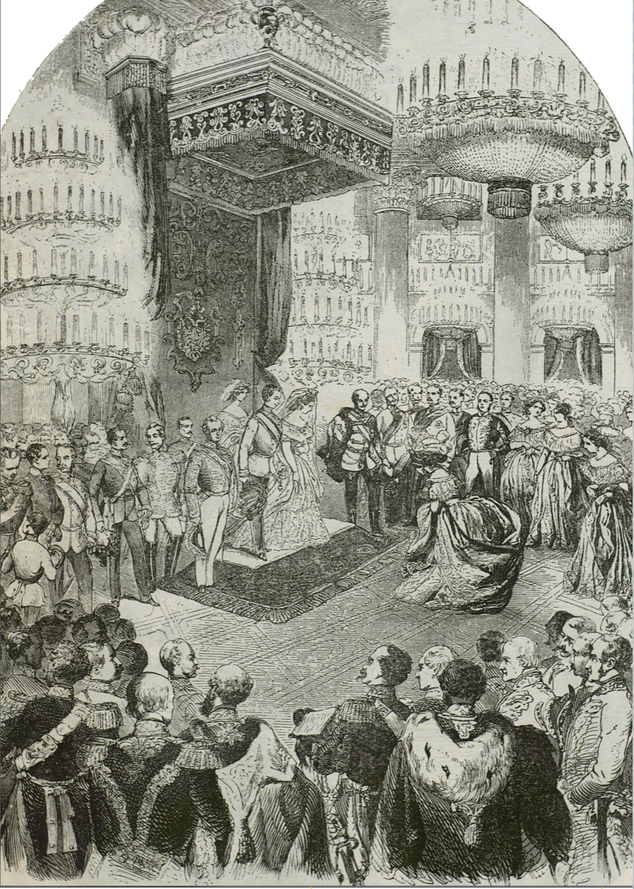 réception de mariage de François-Jospeh et Sissi dans les salon de la Hofburg